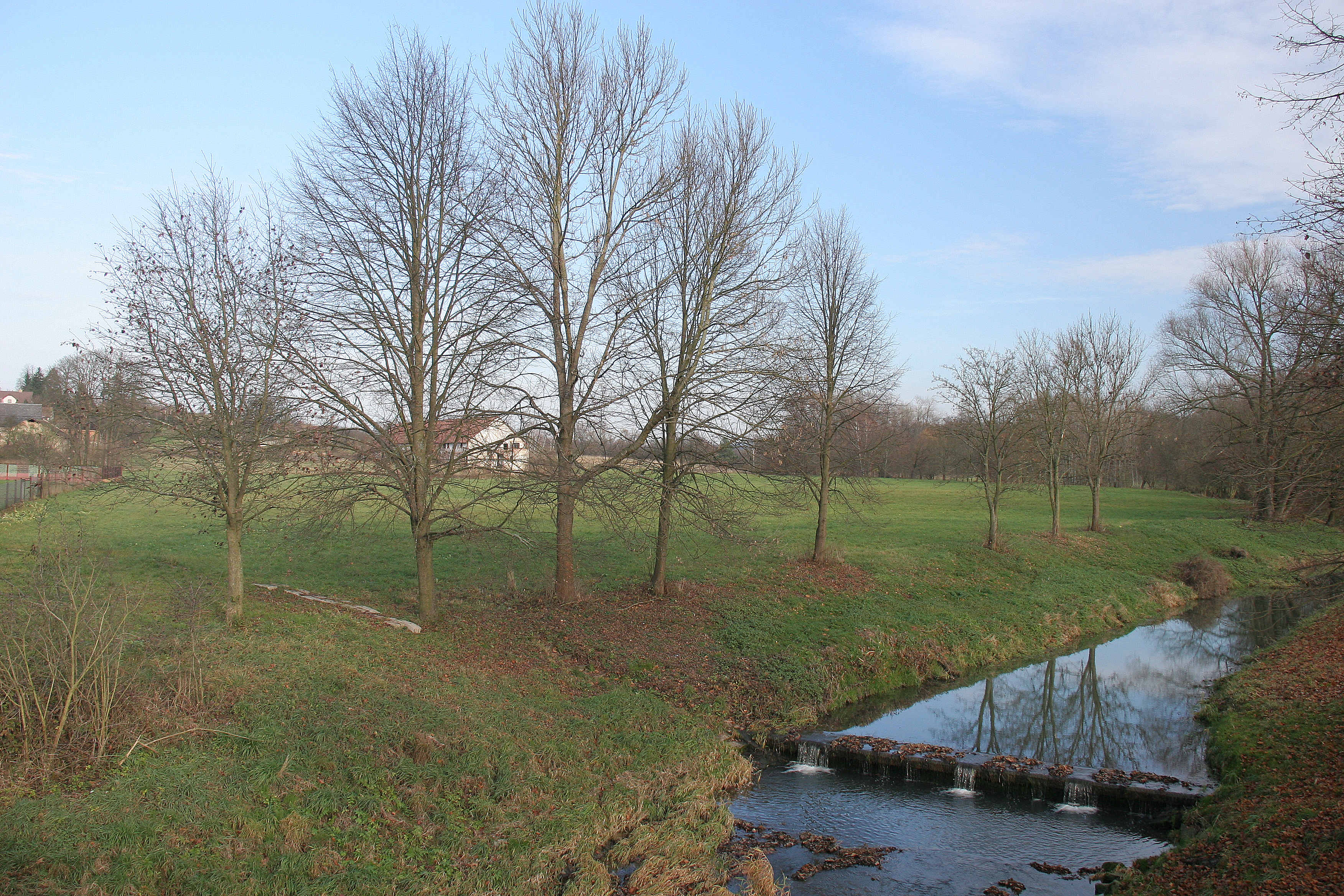 Polánky nad Dědinou - Dědina